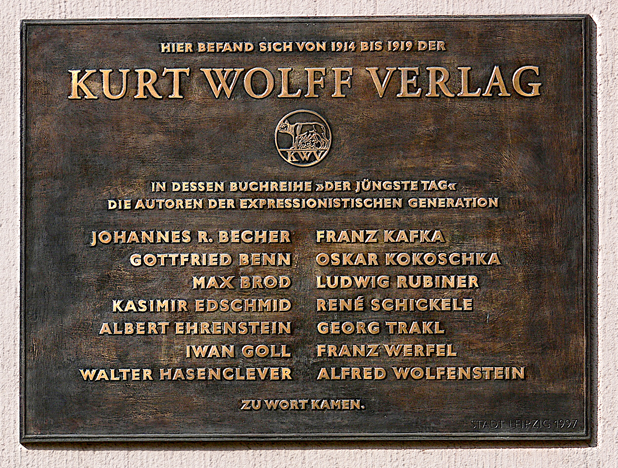 Leipzig, ehem. Sitz des Kurt Wolff Verlags, Gedenktafel